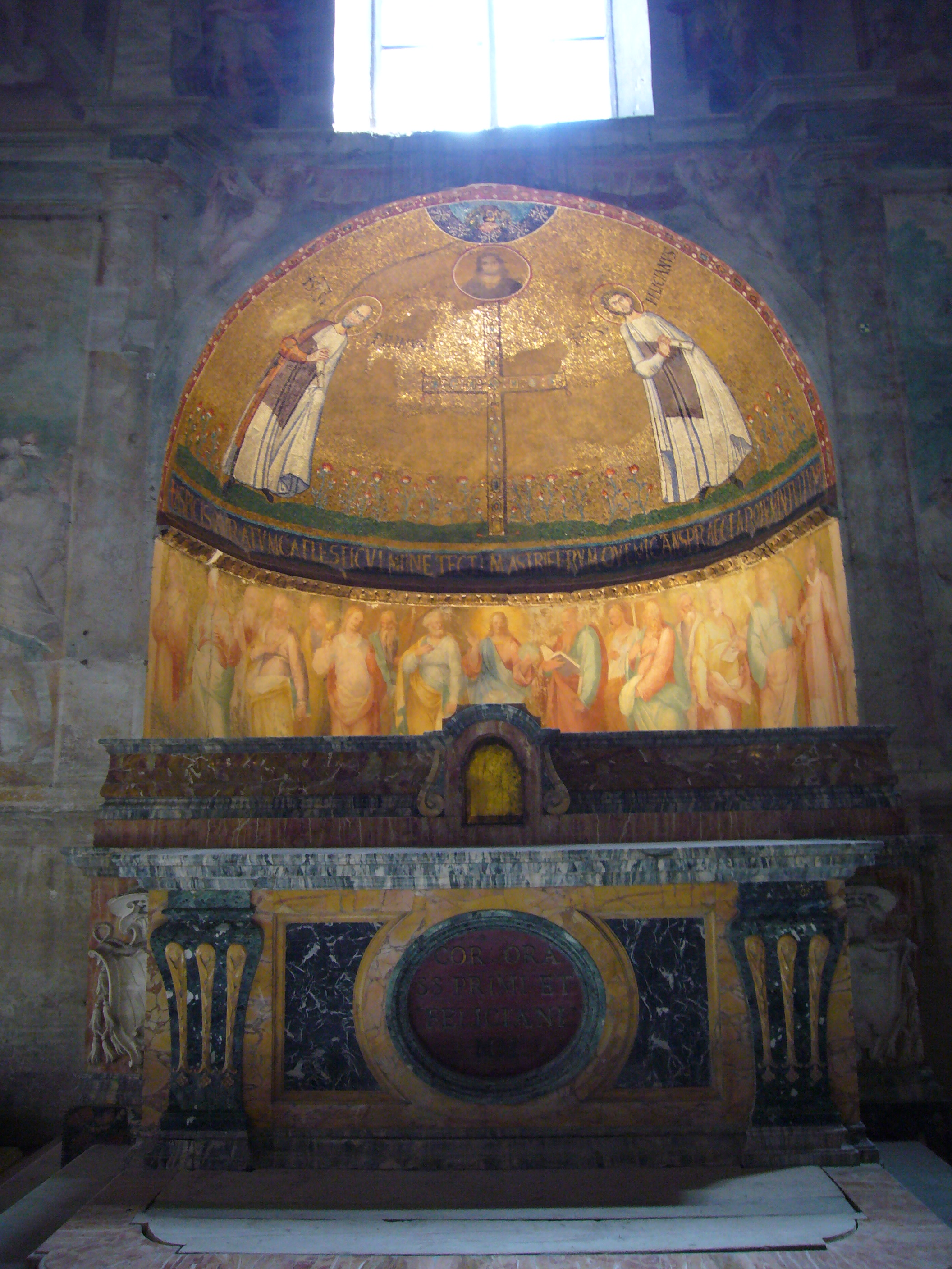 Roma, santo Stefano Rotondo. Mosaico absidale della cappella dei ss. Primo e Feliciano.